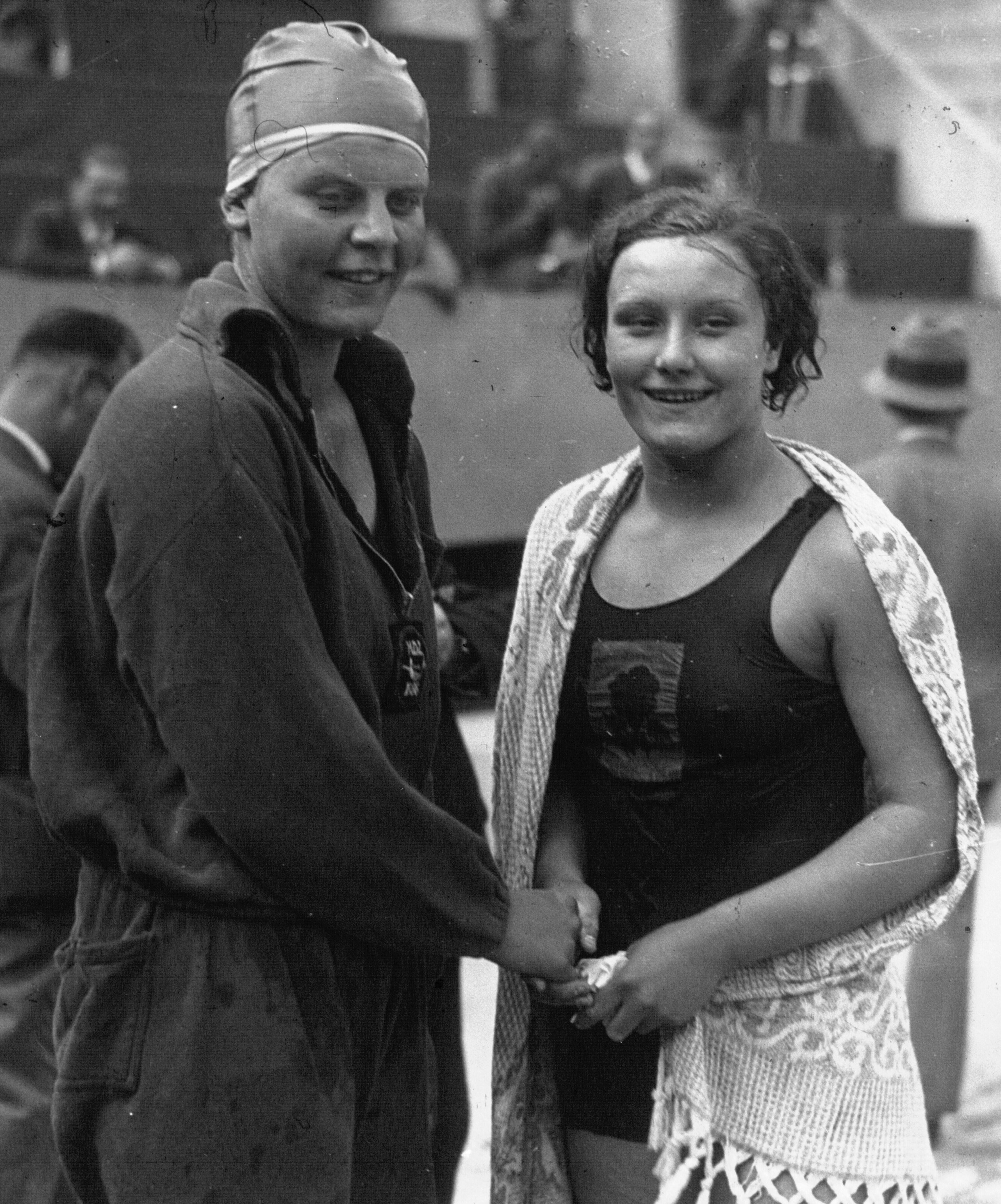 Les Tourelles : Championnats d'Europe : de gauche à droite, Mlles Kastein et Wolstenholme (portrait à 3 m)